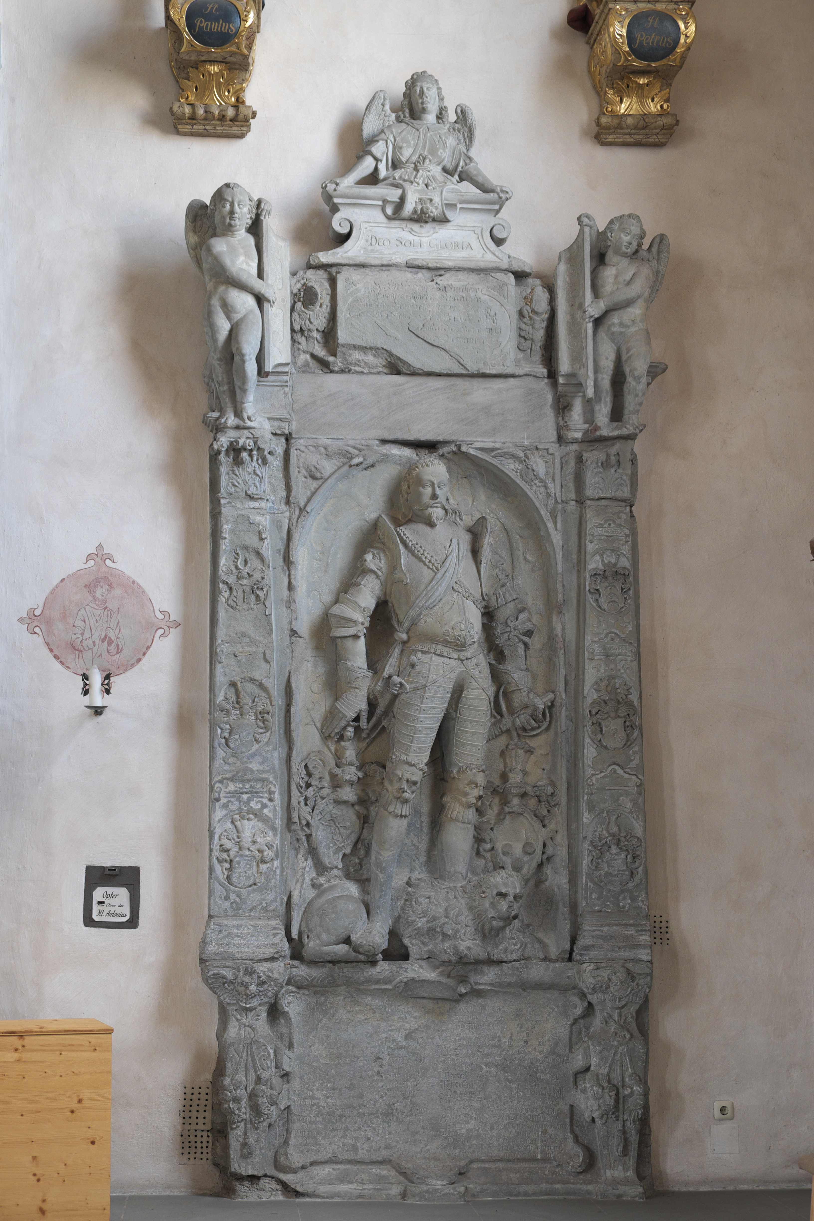 Katholische Stiftskirche St. Philipp und Jakob in Bad Grönenbach im Landkreis Unterallgäu (Bayern/Deutschland), Epitaph für Joachim von Pappenheim († 1599)